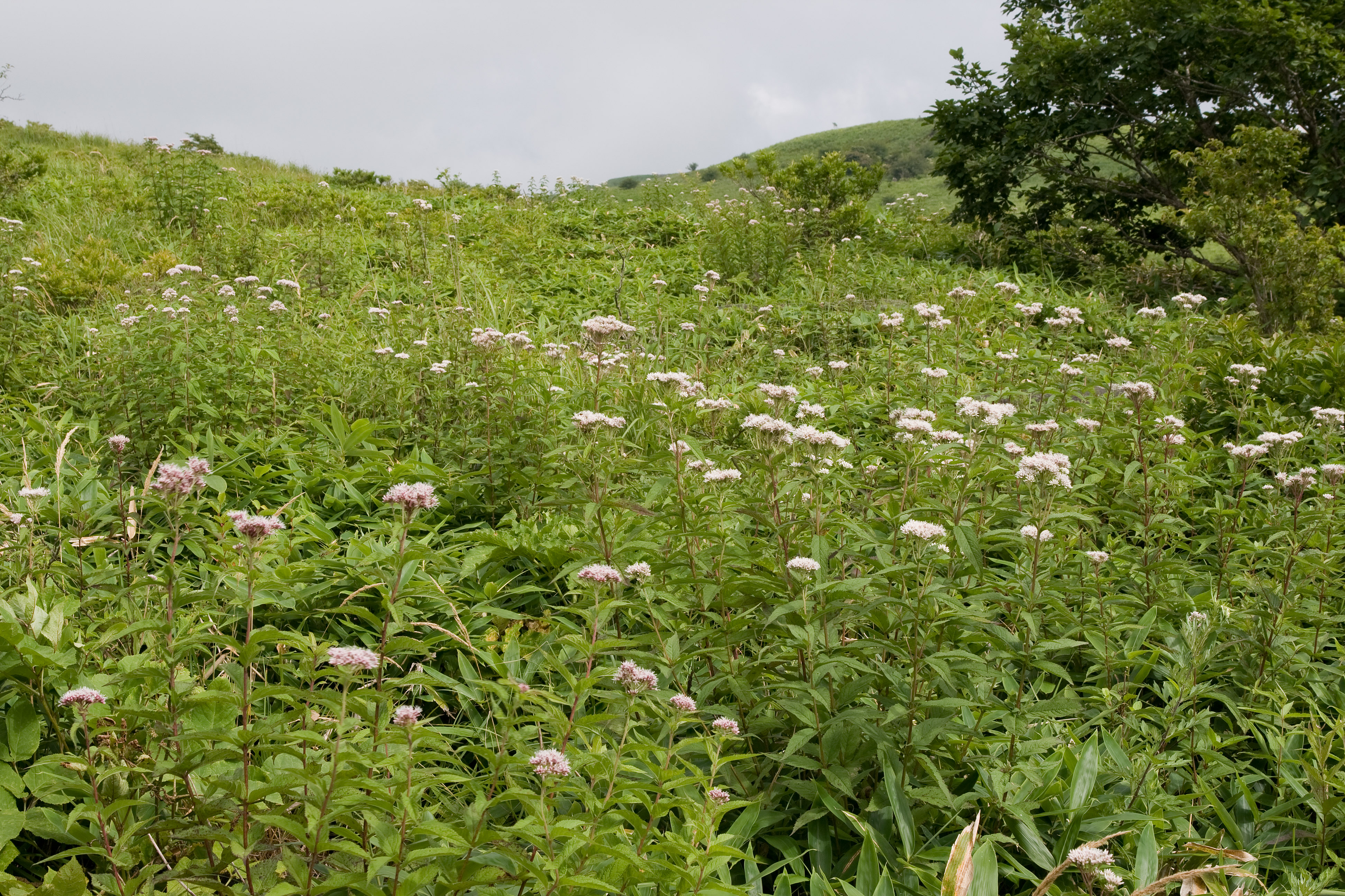 ヨツバヒヨドリ (学名:Eupatorium chinense var. sachalinense)